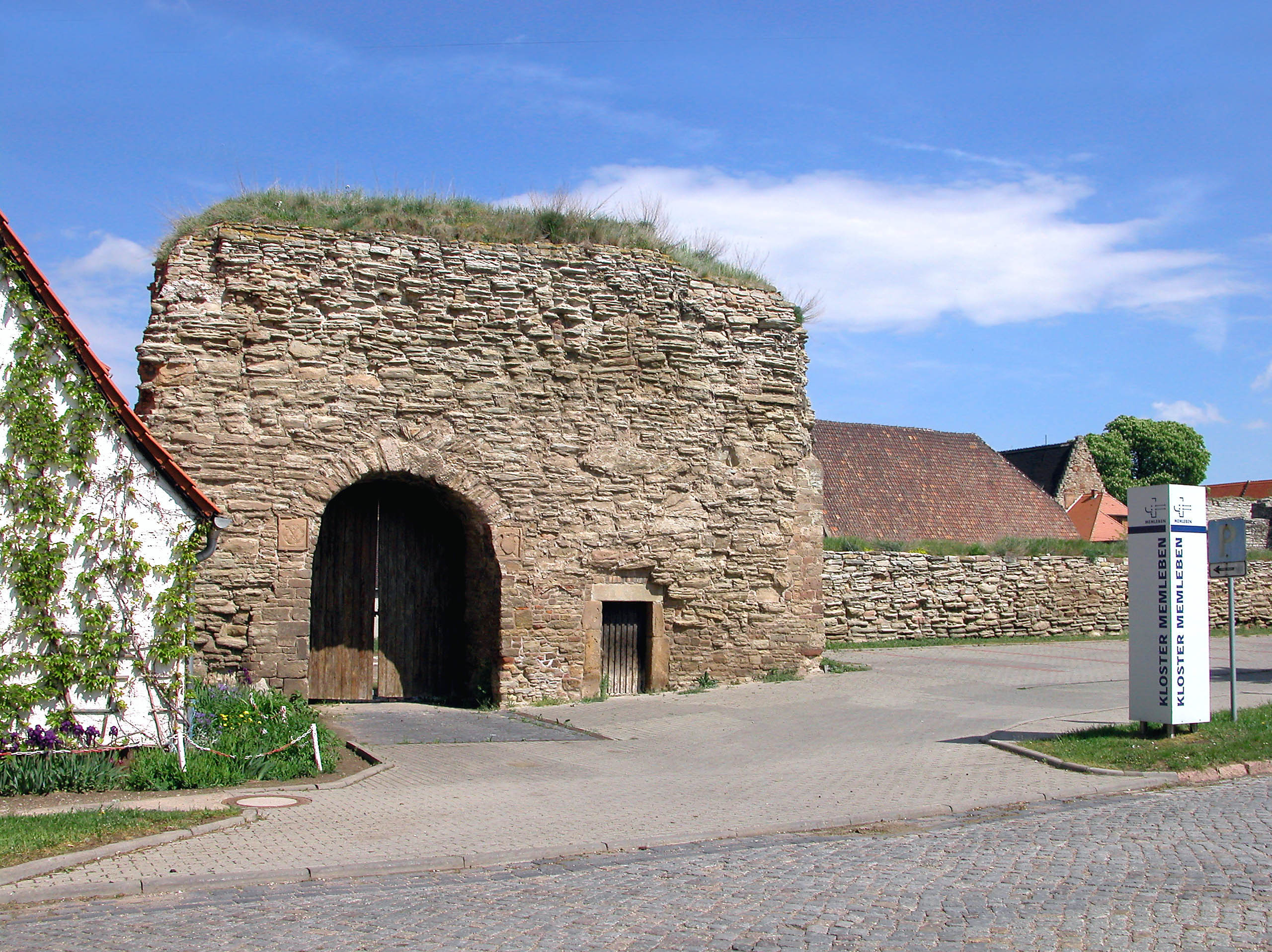 04.05.2004 06642 Memleben: Ehemalige ottonische Kaiserpfalz und Benediktinerkloster. Am 2. Juli 936 verstarb hier der erste deutsche König Heinrich I. Im Bild von Süden das Kaisertor der ehemaligen Marienkirche aus dem 10. Jahrhundert. Diese Ottonischen Abteikirche zeichnet sich nur noch am Boden ab: Basilika mit zwei Querhäusern, zwei Chören und zwei Krypten, nach dem Magdeburger Dom der größte Bau des 10. Jh. im Osten des ottonischen Reiches. [DSCN3272,JPG]20040504100DR.JPG(c)Blobelt